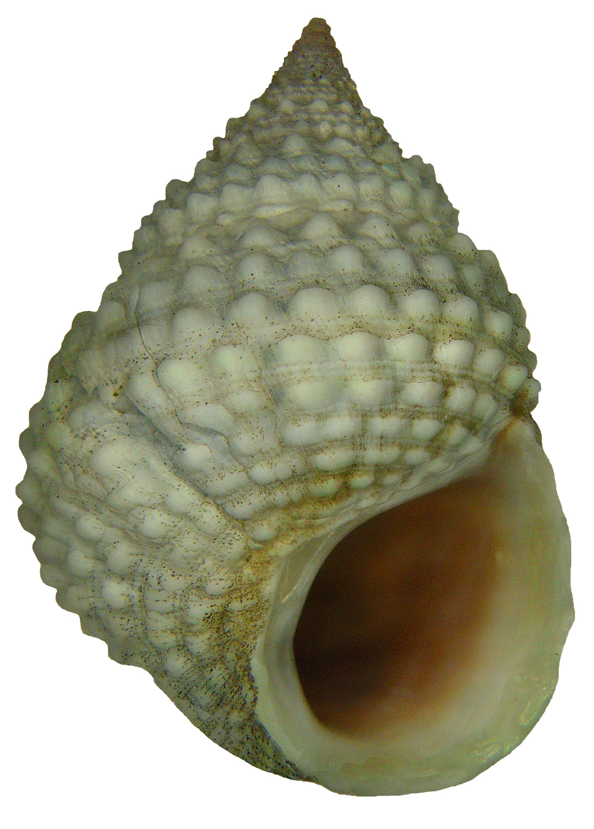 Cenchritis muricatus (Linnaeus, 1758) (synonym: Tectarius muricatus (Linnaeus, 1758)) Familie: Littorinidae Groesse: 24 mm Verbreitung; Süd-Florida, Westindien, Bermuda Fundort: Dominikanische Republik, Luperon leg.det. U.Schmidt, 1989 Photo: U.Schmidt, 2008